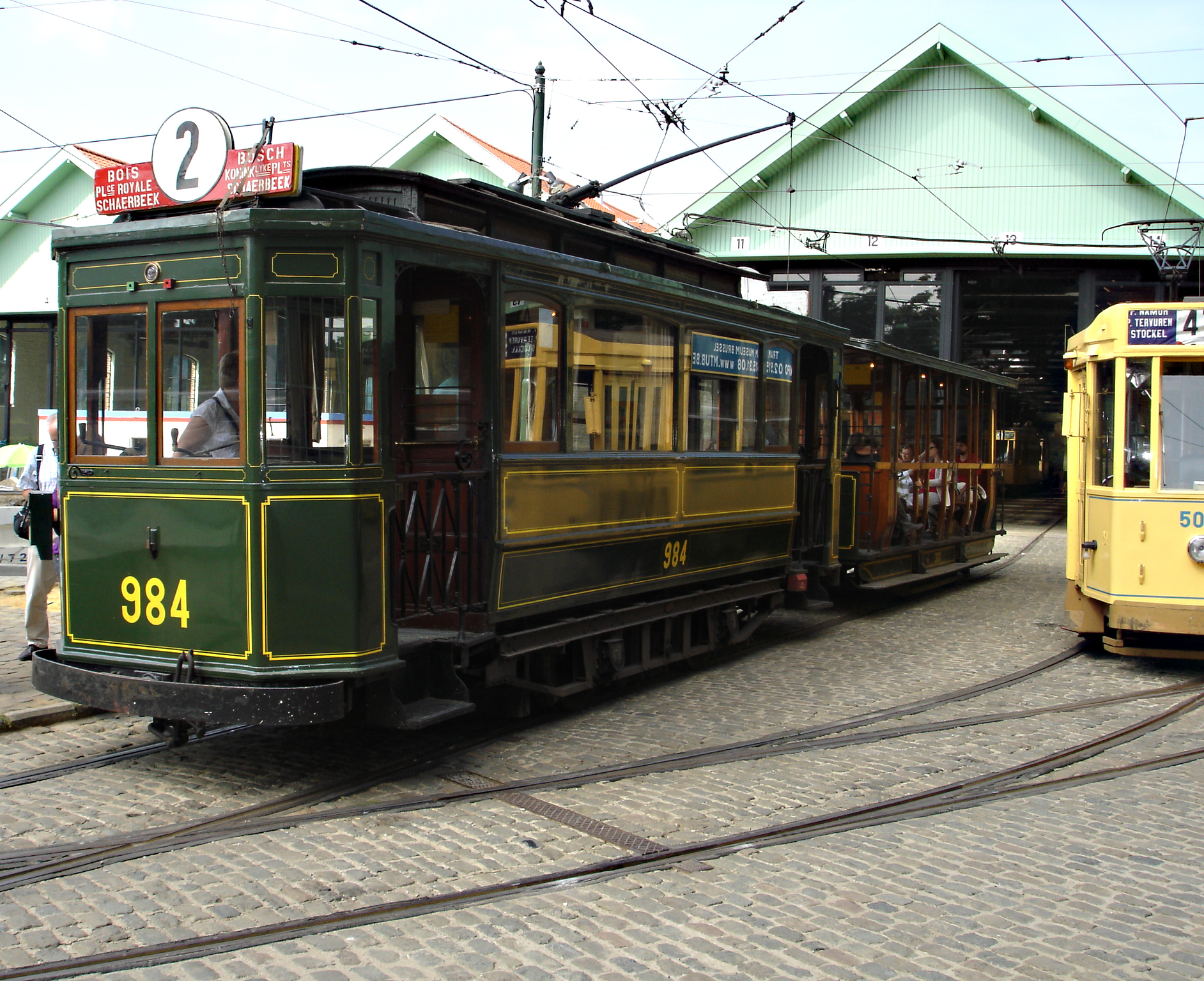 Tram 984, museum Brussel